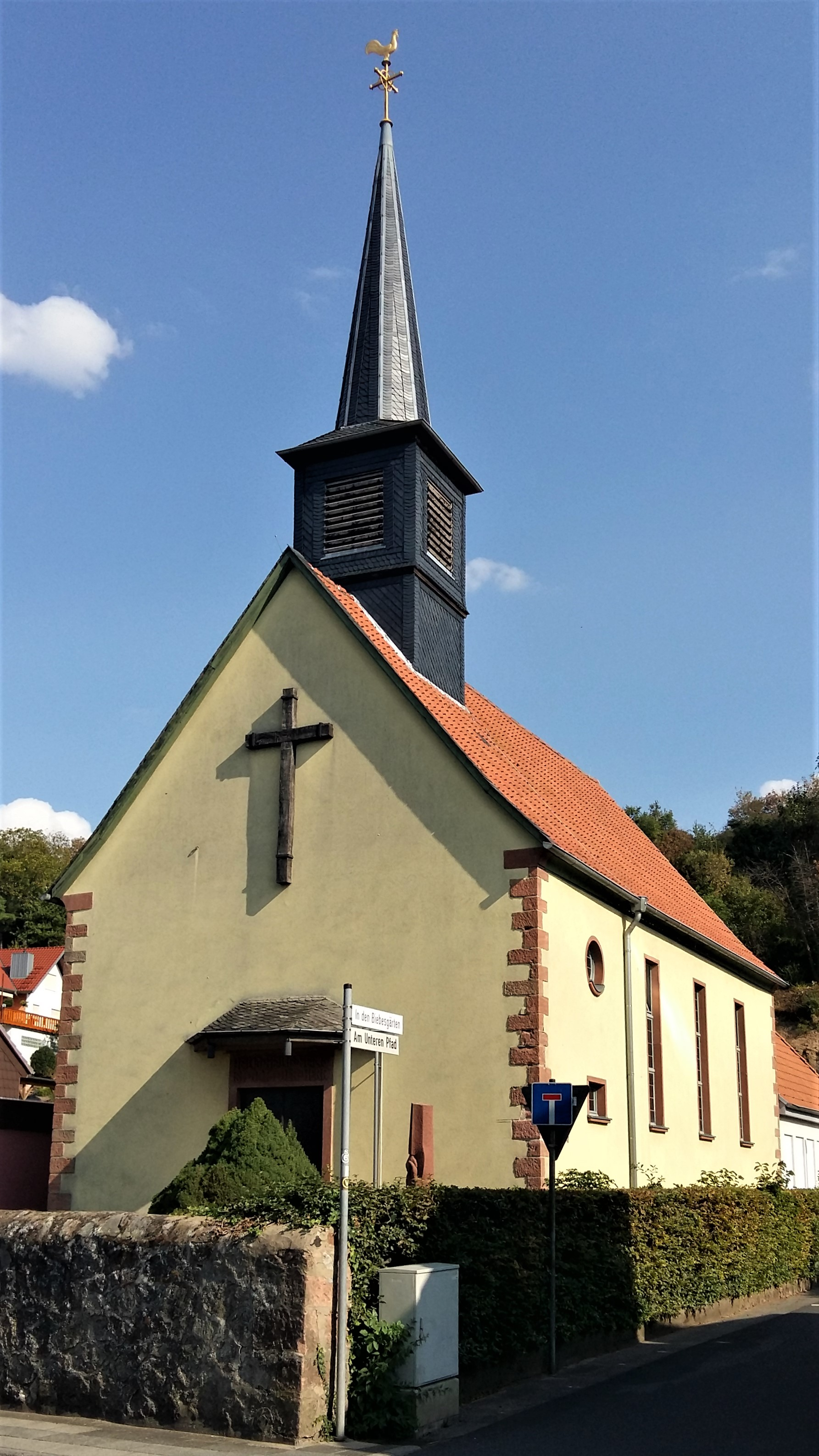 Evangelische Kirche in Schaafheim-Schlierbach in der Schaafheimer Straße von Westen (September 2018).